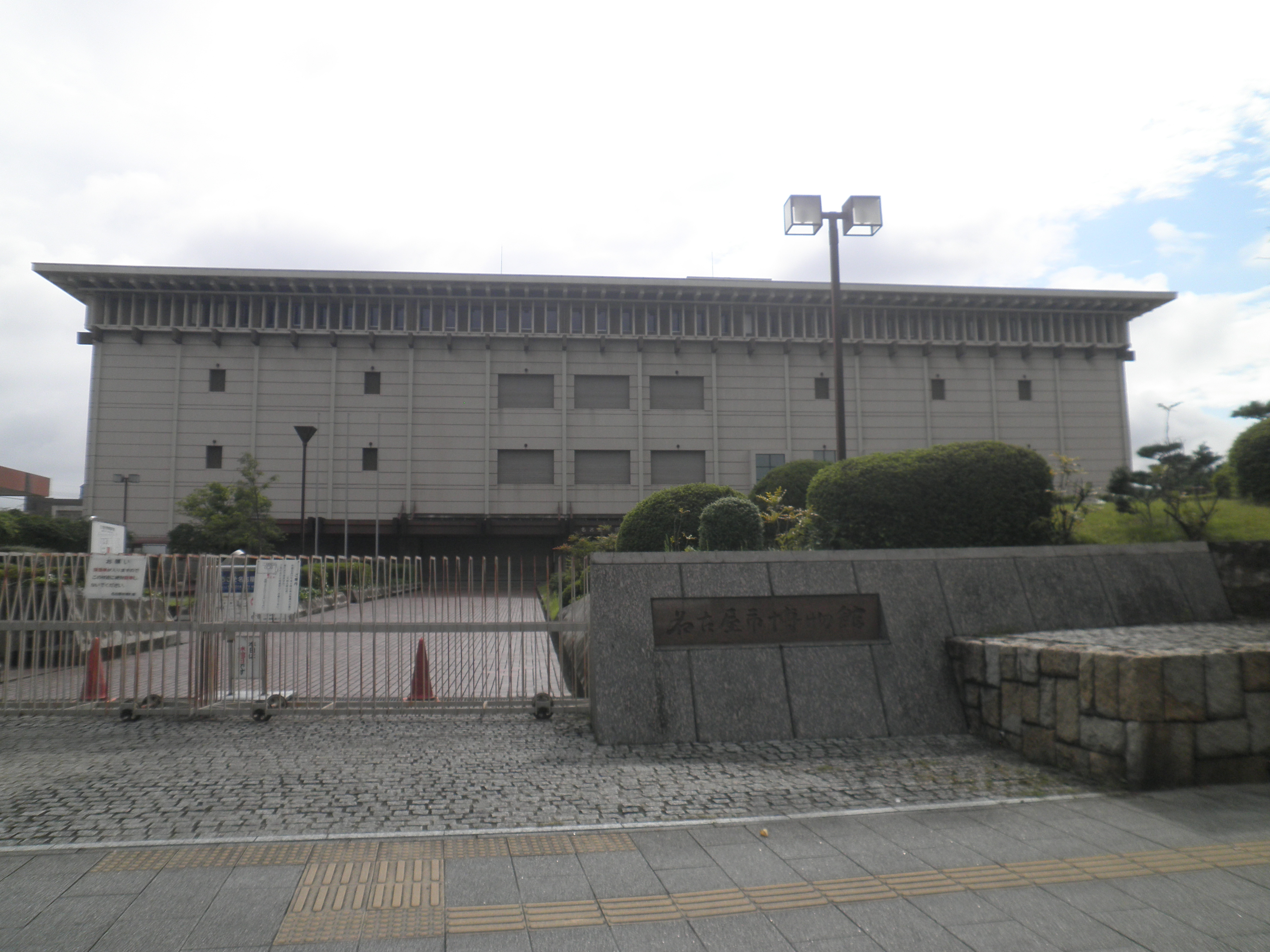 名古屋市瑞穂区にある名古屋市博物館